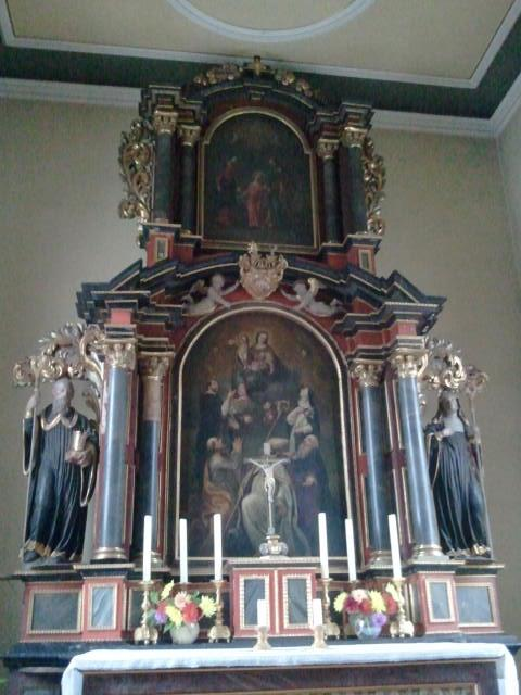 Alte Kapelle von St. Elisabeth